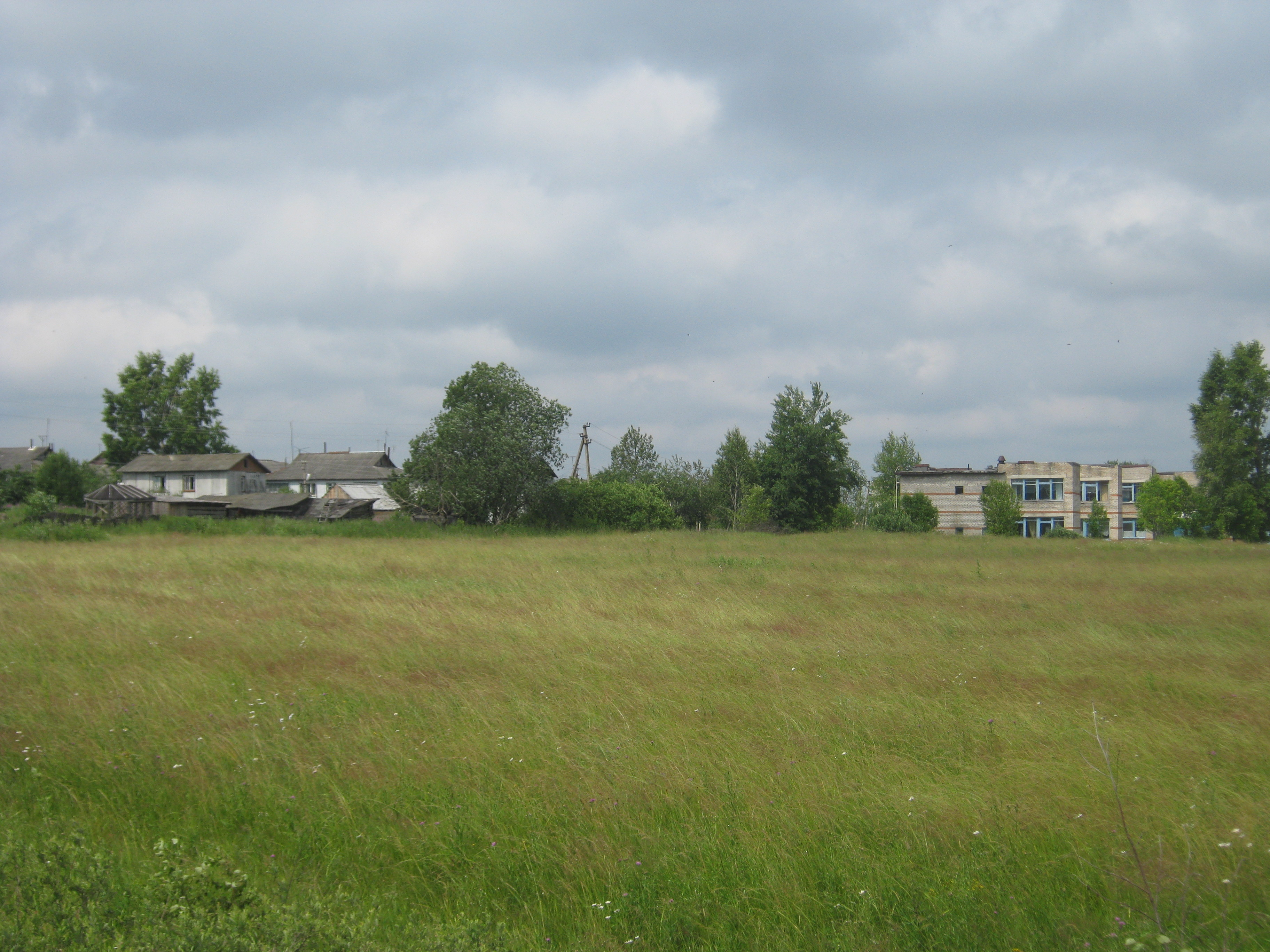 Вид на деревню Петушки Гагаринского района Смоленской области